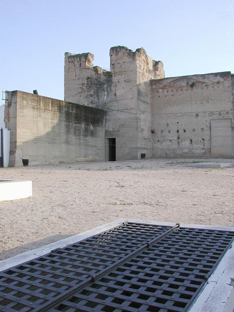 Vista del Castillo de Moguer desde la entrada al aljibe árabe, situado en el patio de armas.